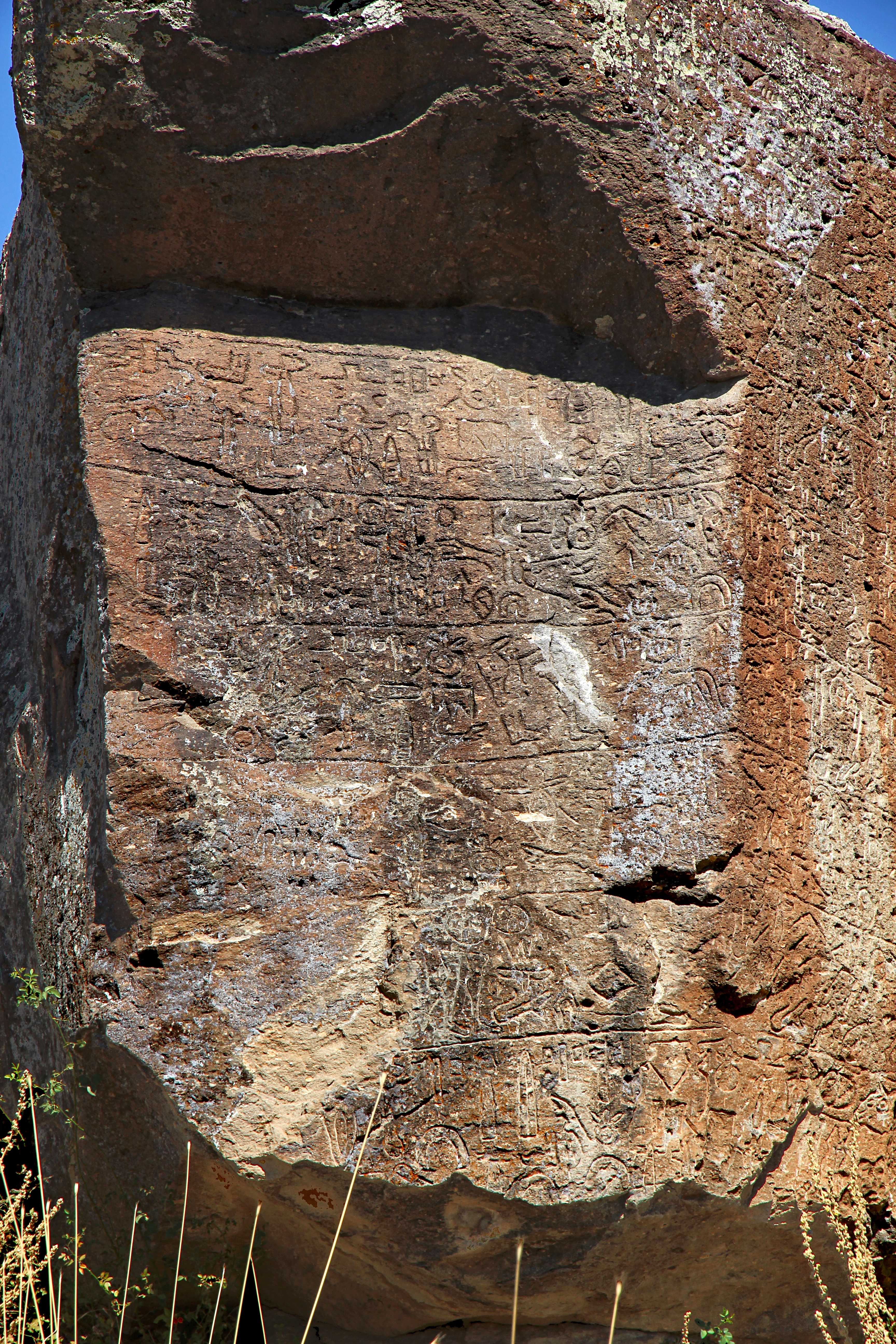 Luwische Felsinschrift von Topada, heute Acıgöl bei Aksaray, Zentraltürkei